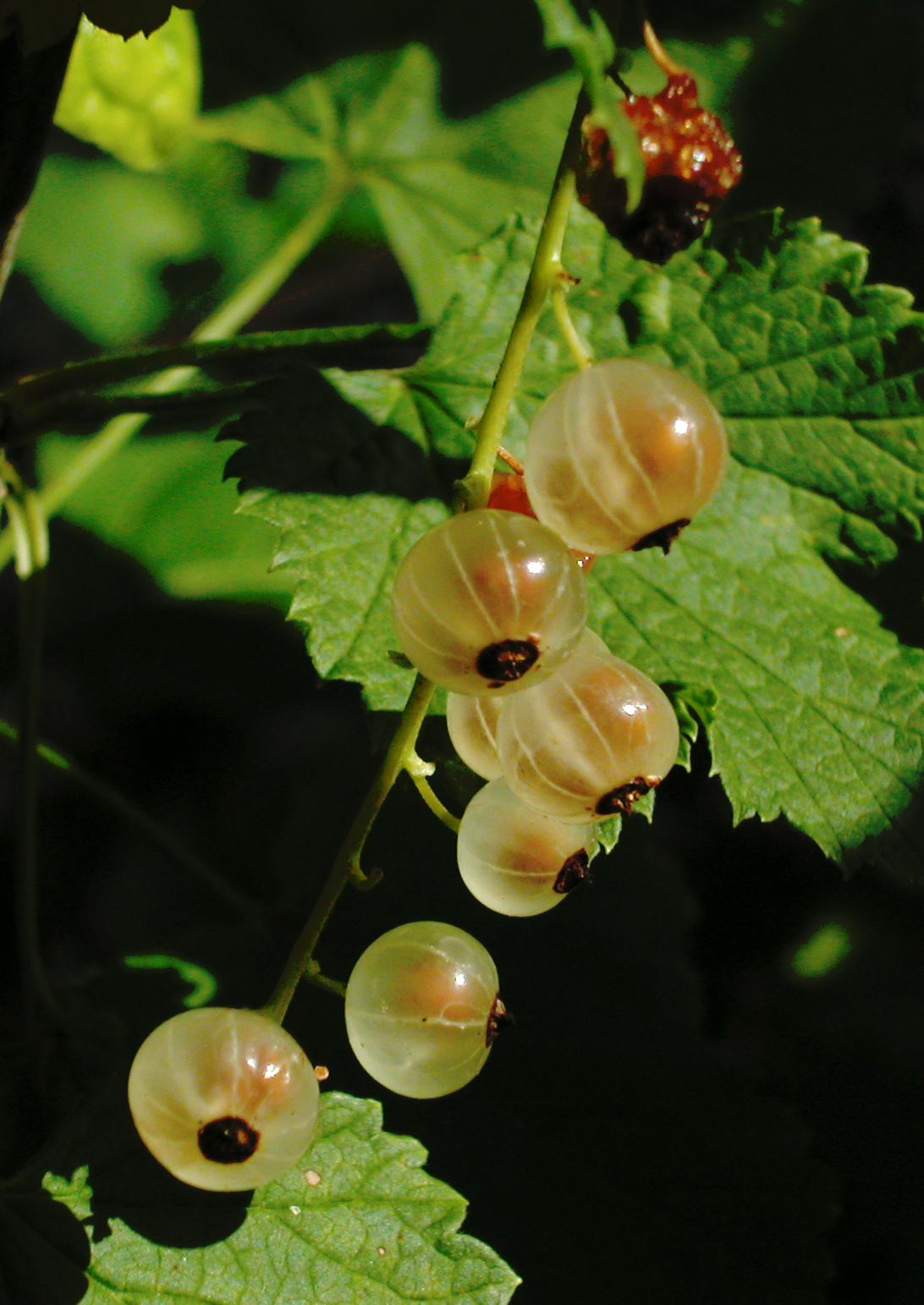 Reife Beeren